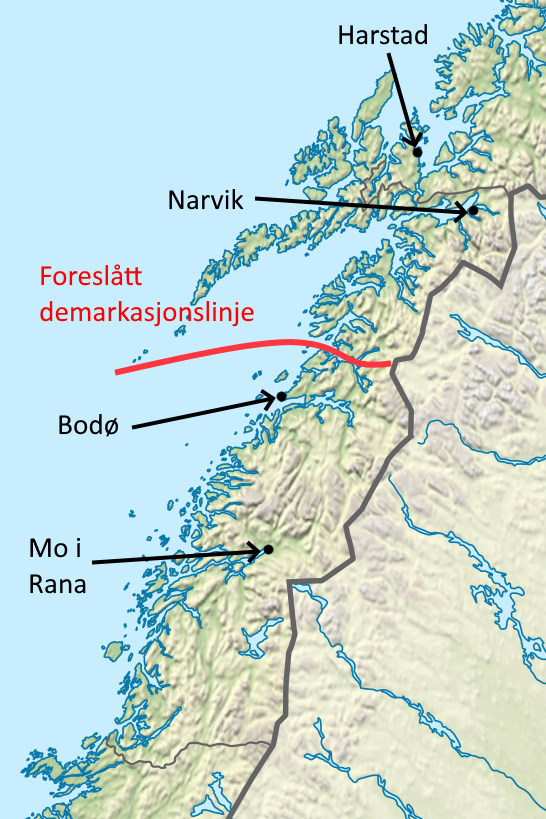 Demarkasjonslinjen, som norske og tyske myndigheter diskuterte i 1940. Alt sør for linjen skulle bli besatt av Tyskland, mens Norge skulle fortsette å styre seg selv nord for linjen. Den ble aldri noe av, og Norges regjering reiste til Storbritannia for å fortsette kampen derfra.